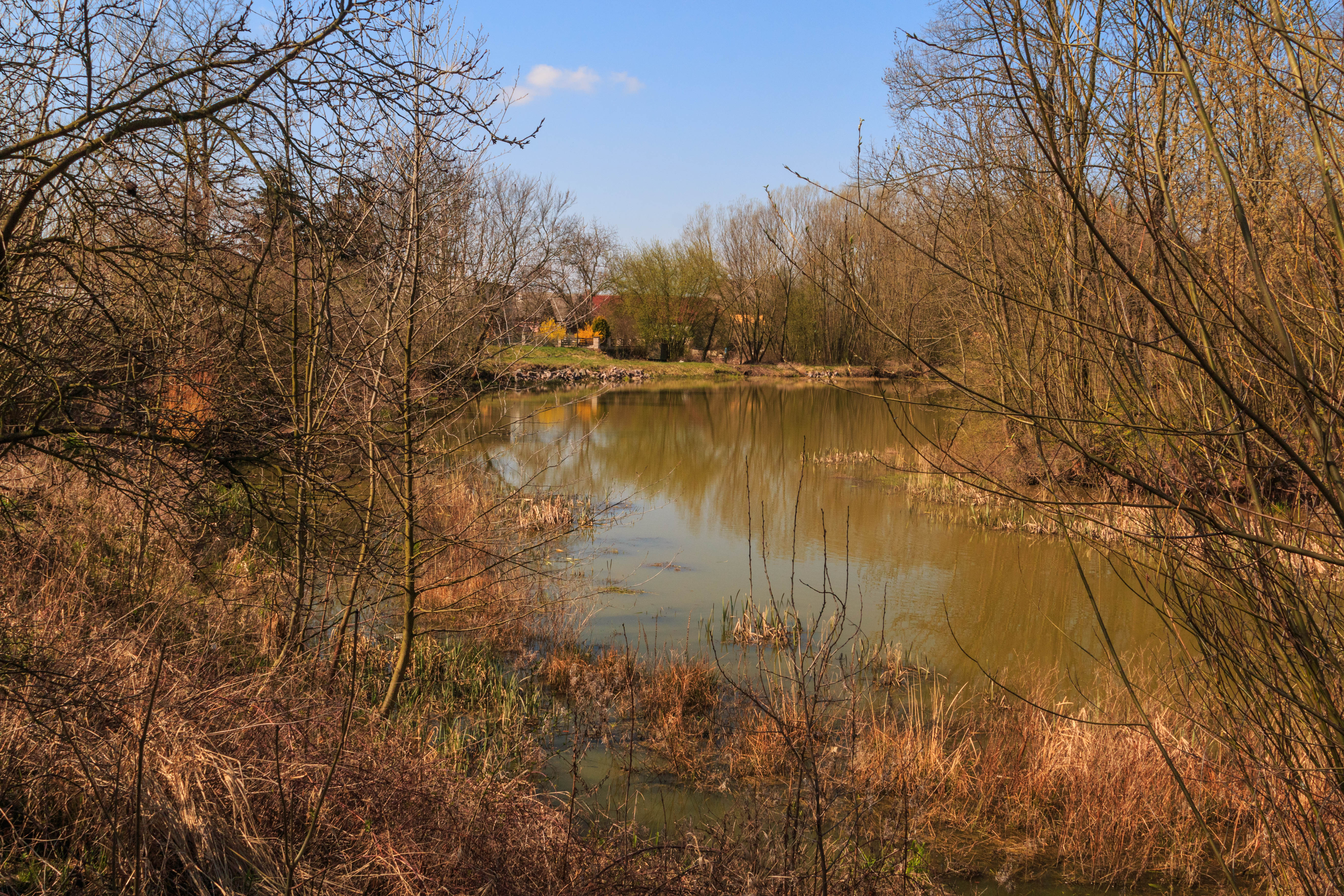 Labecký rybník Project: Vodstvo.